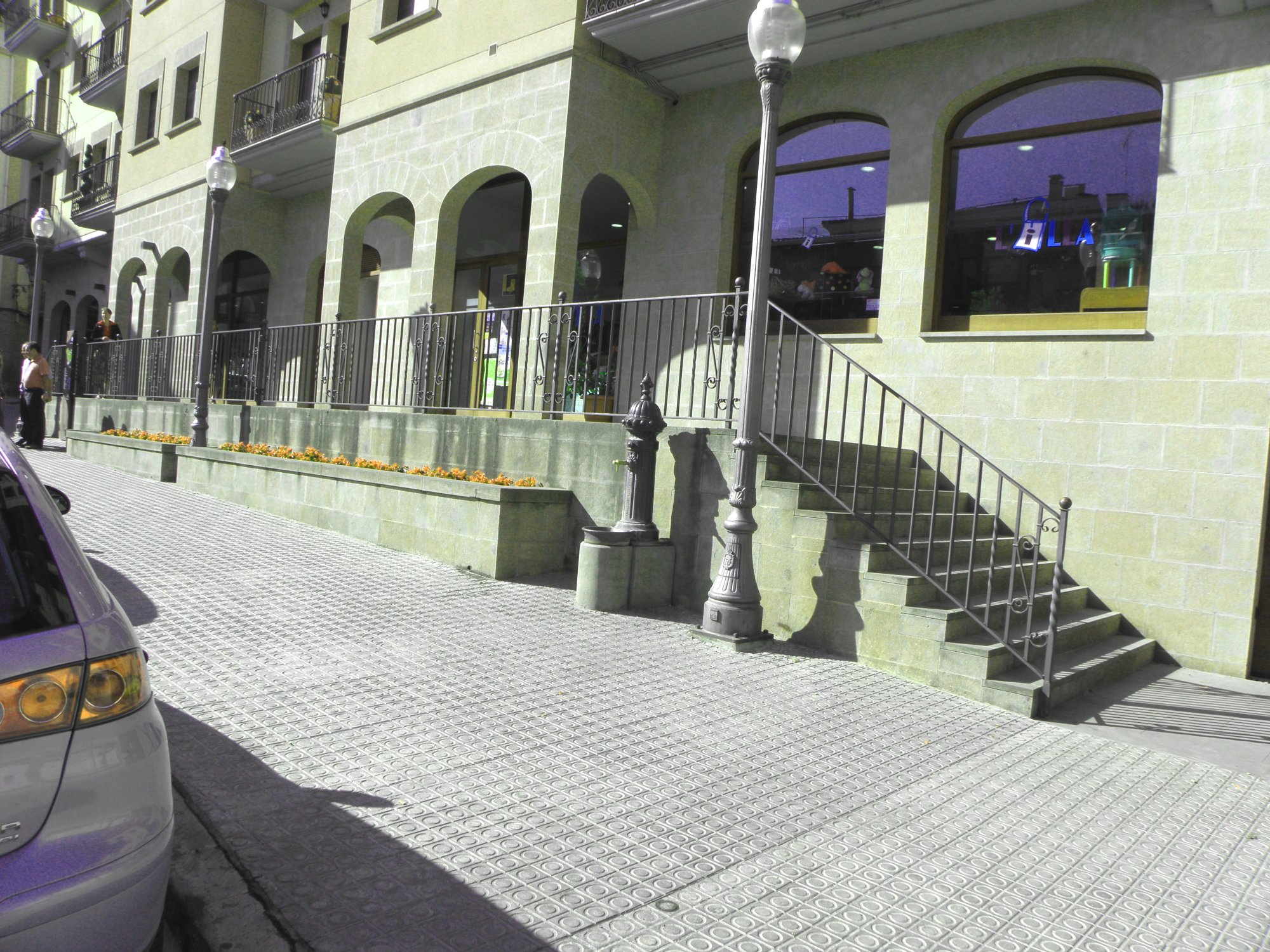 La font de la Plaça Sant Roc, a Solsopna (Solsonès).